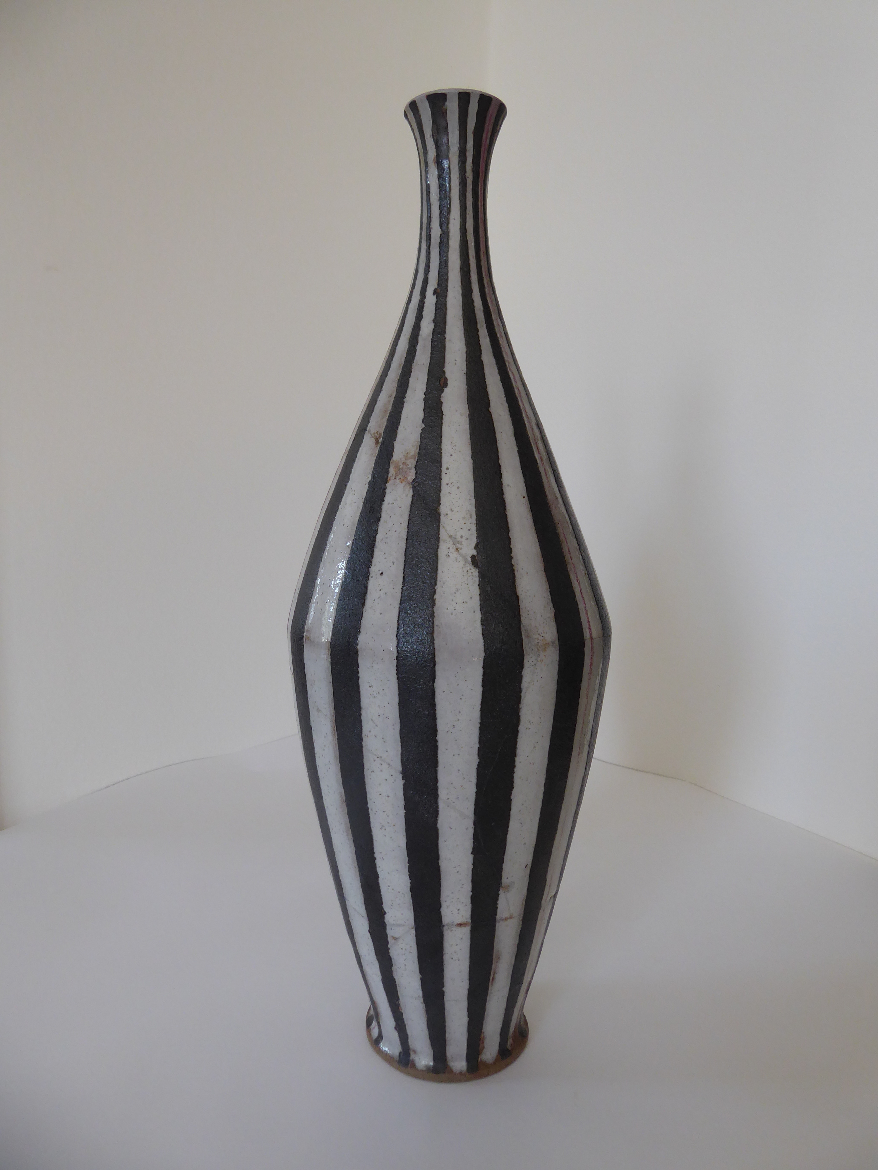 Gertrud Schwarze, Zweitfertigung der 1952 prämierten Vase mit Gebrauchsspuren, Privatbesitz. Gertrud Schwarze, double of the prize-vase of 1952, private property